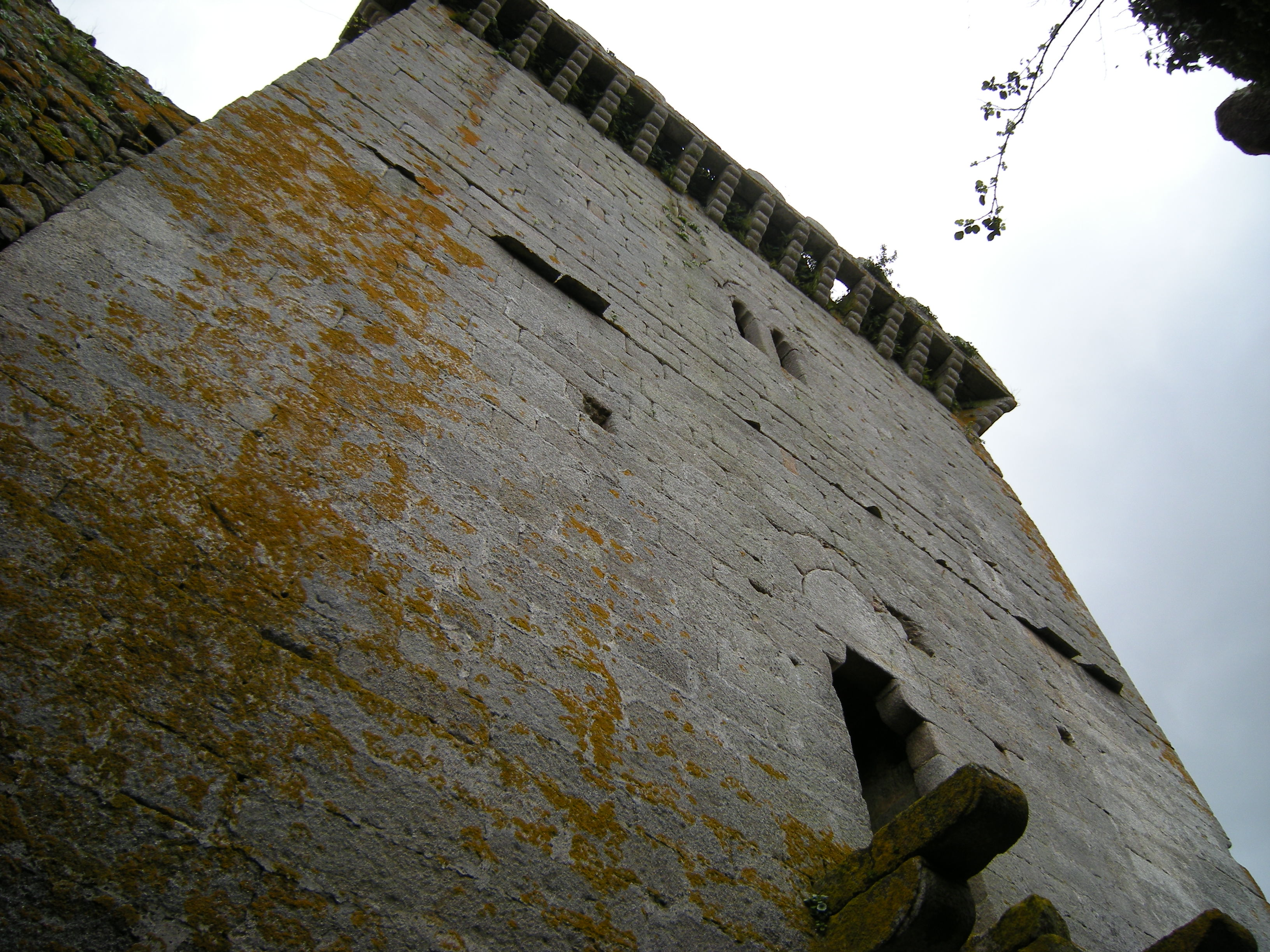 Torre del homenaje.